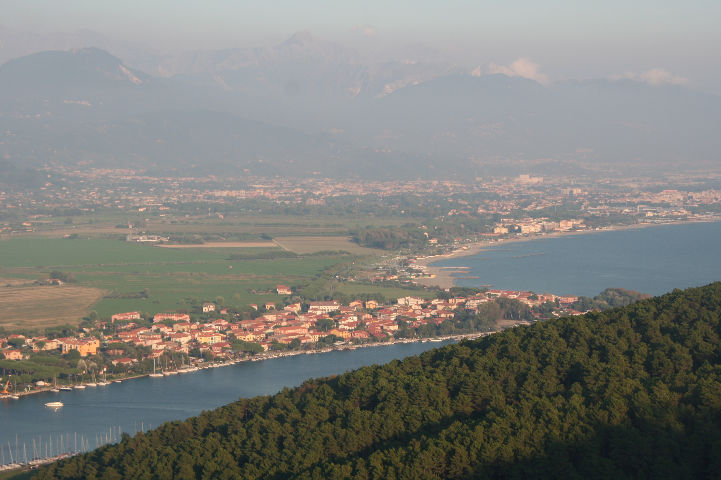 Il borgo di Fiumaretta